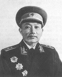 刘志坚中将1955年授衔照